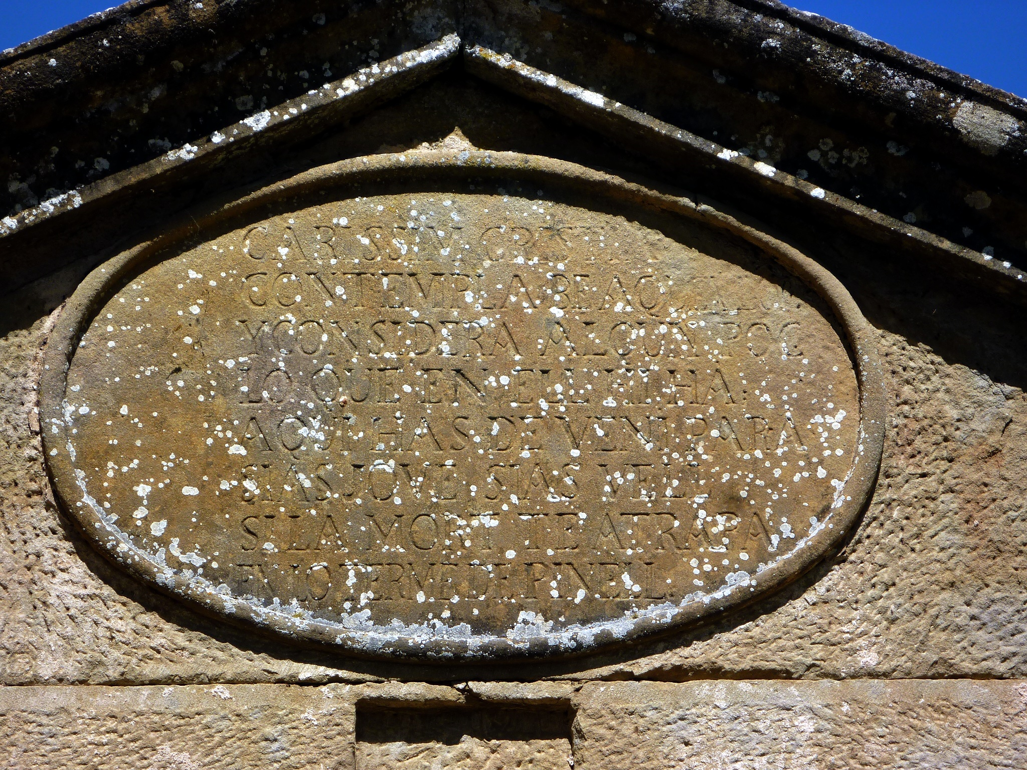 Cementiri de Pinell (Pinell de Solsonès): la inscripció diu: "CARISSIM CRESTIA - CONTEMPLA BE AQUEST LLOC - I CONSIDERA ALGUN POC - LO QUE EN ELL HI HA - AQUI HAS DE VENIR A PARA - SIAS JOVE SIAS VELL - SI LA MORT TE ATRAPA - EN LO TERME DE PINELL"